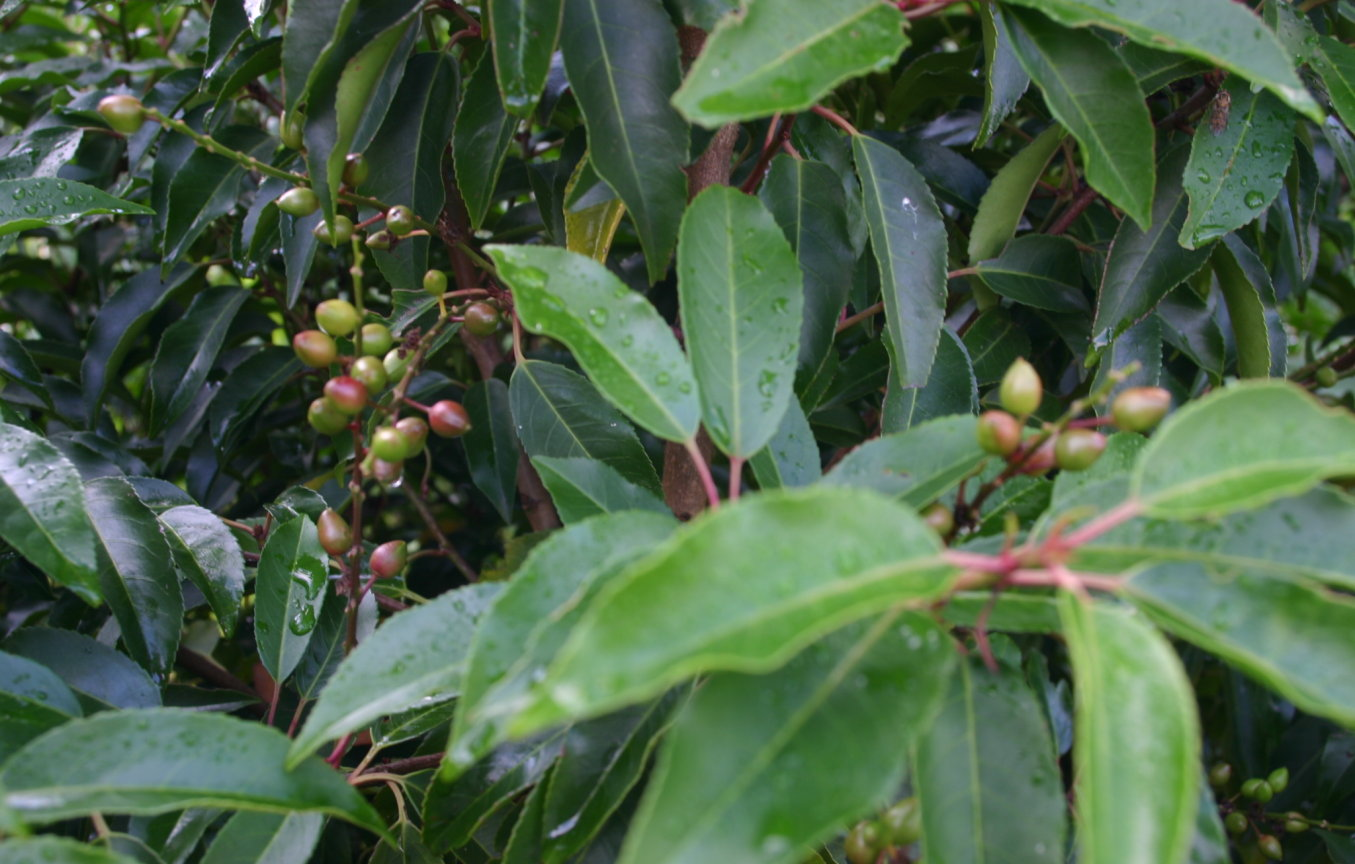 Prunus lusitanica: Fruits